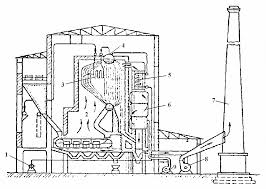 это схема парового котла